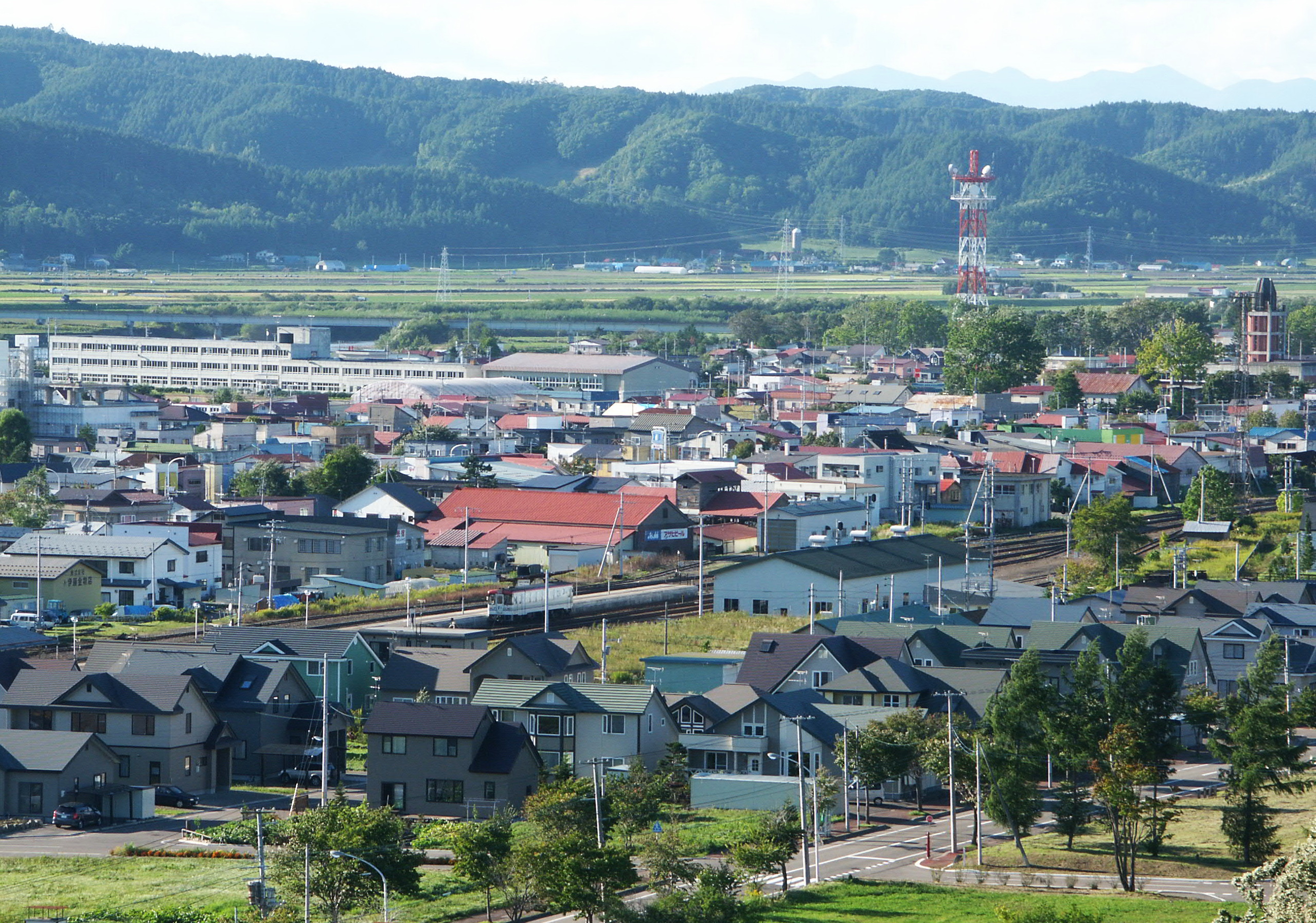 Ikeda Tokachi 十勝池田